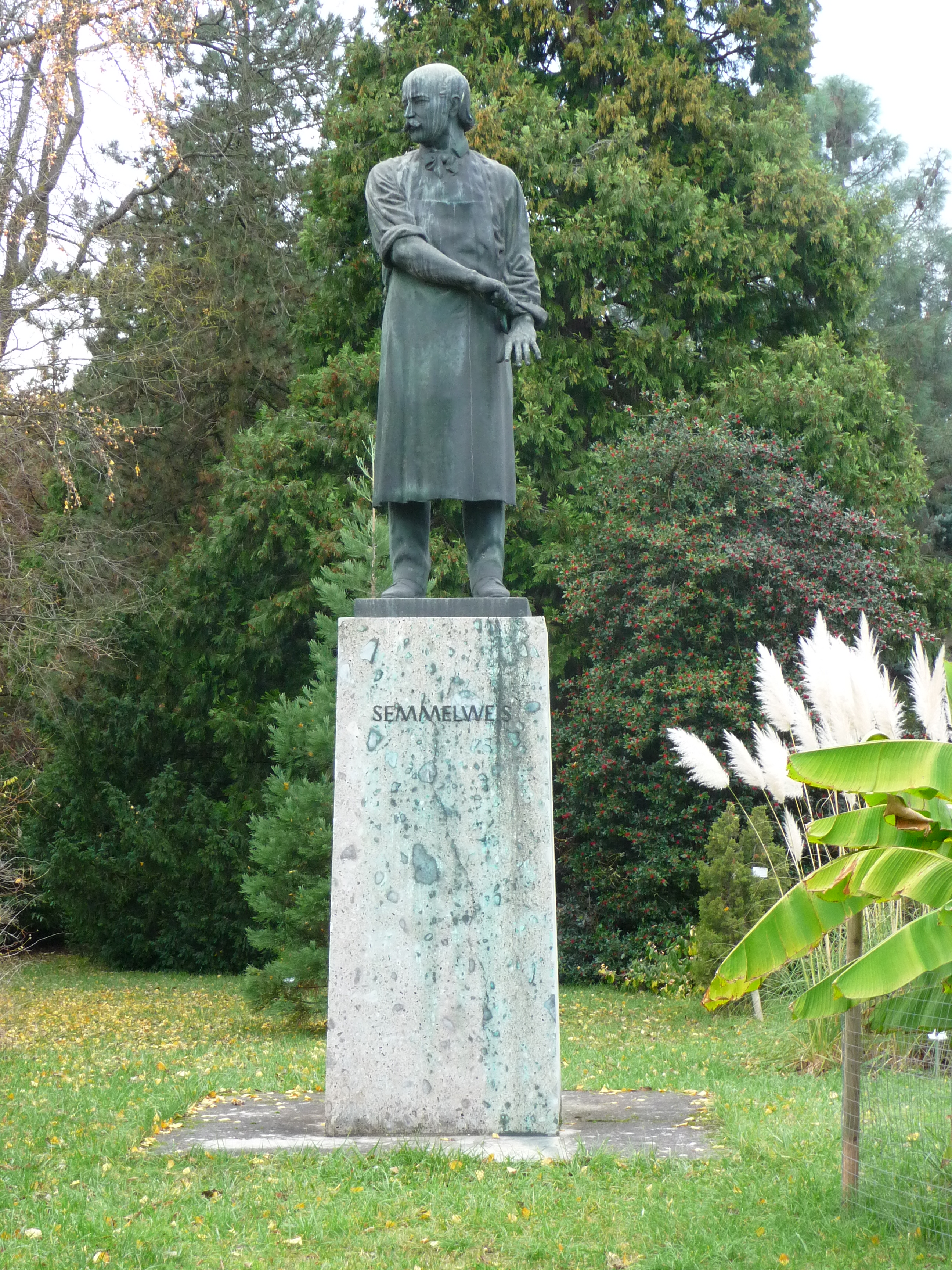 Semmelweis-Denkmal zwischen Alter Kinderklinik und Botanischem Garten im Neuenheimer Feld in Heidelberg (Baden-Württemberg, Deutschland); Ignaz Philipp Semmelweis (1818-1865): ungarischer Arzt praktizierte als Gynäkologe in Wien. Bedeutend waren seine statistischen Methoden, mit denen er die Entstehung des Kindbettfiebers nachweisen konnte.